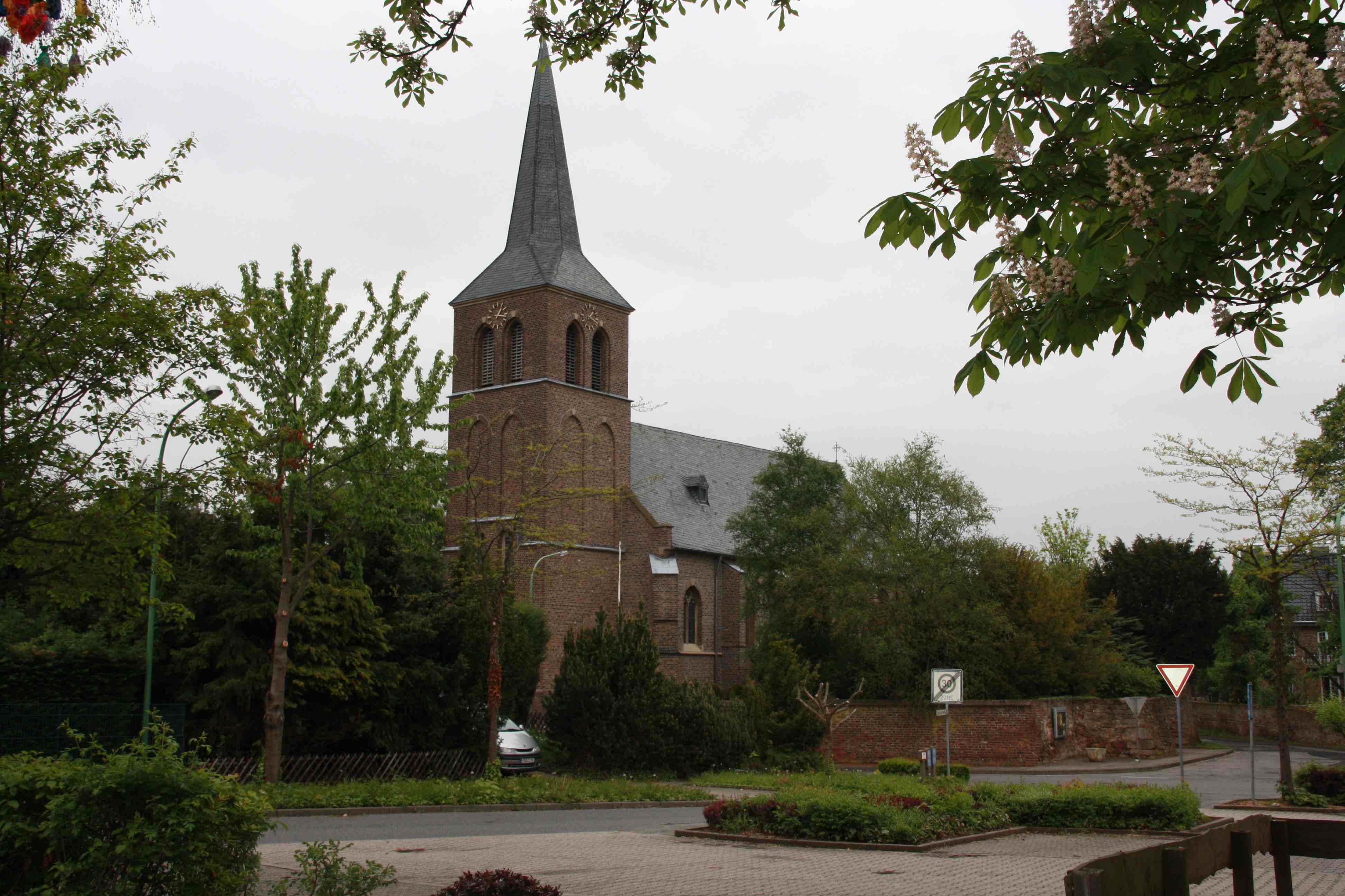 Die Pfarrkirche St. Gertrudis in Binsfeld, Gemeinde Nörvenich